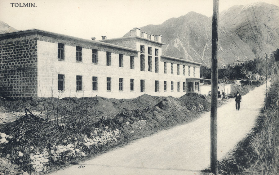 Gradnja vojašnice Tolmin leta 1911.